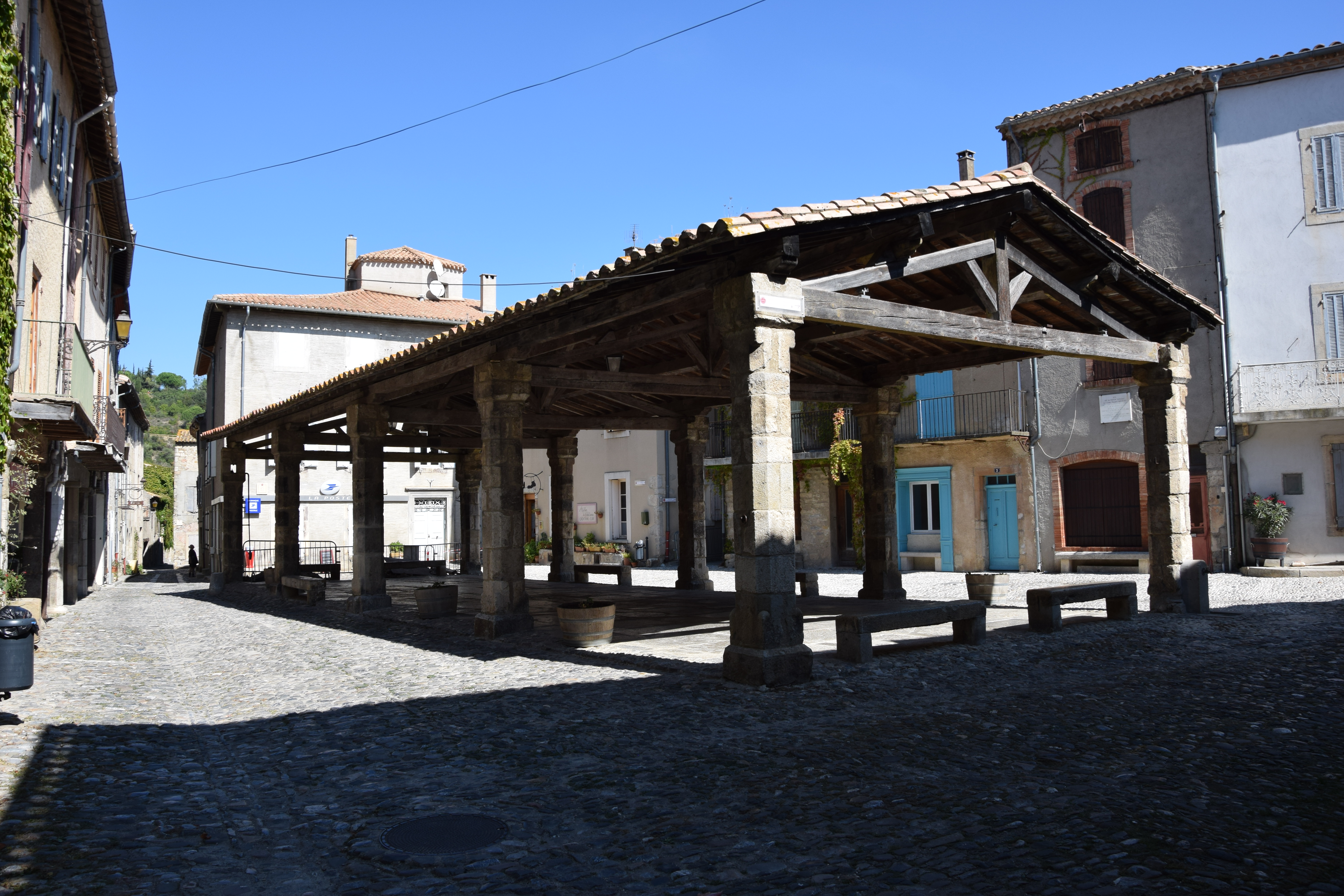 Halle de Lagrasse .